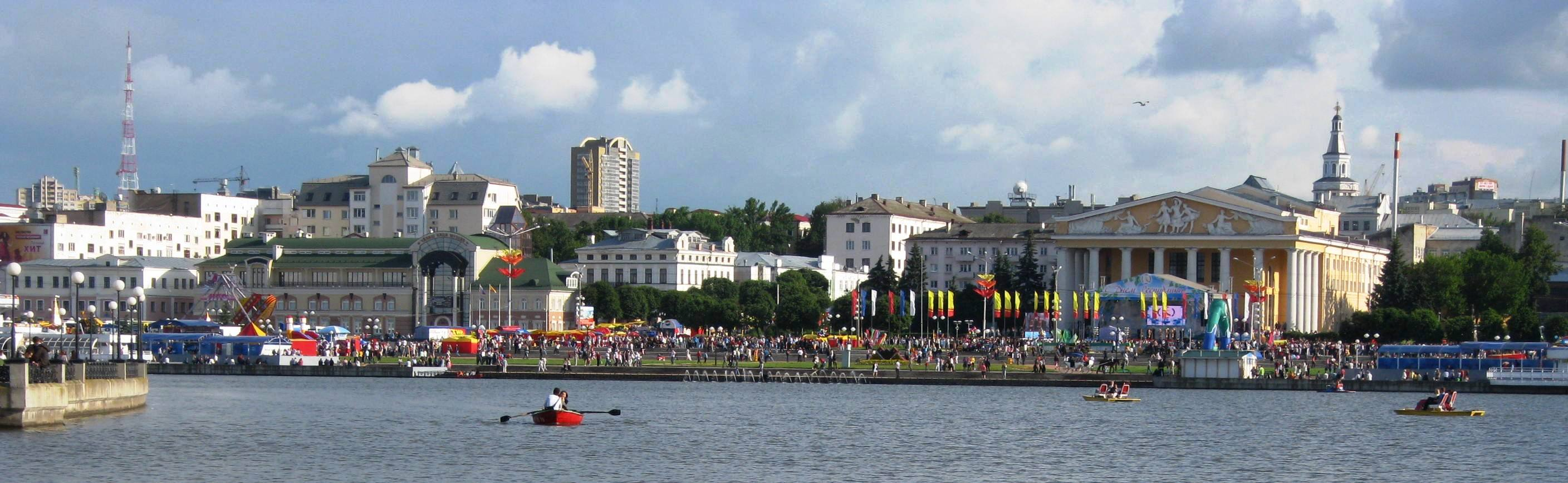 Вид на Красную площадь с Чебоксарского залива (г.Чебоксары)